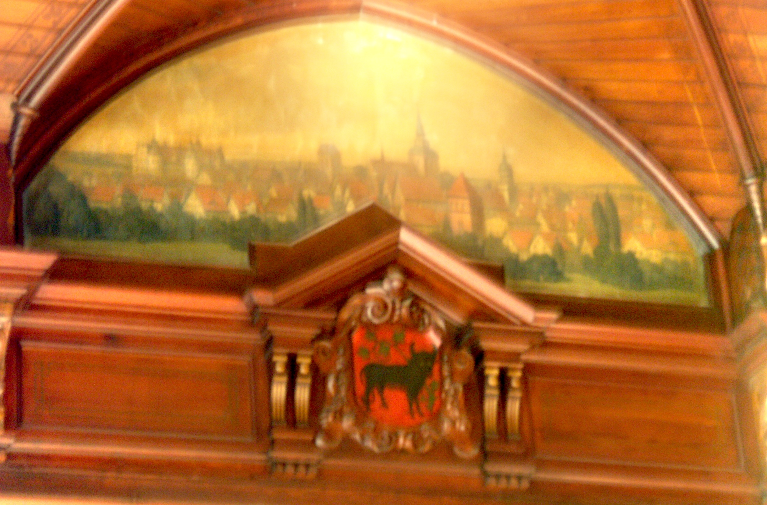 Deckengemälde von Güstrow im Großen Sitzungssaal des Gebäudes der Reichsbahndirektion Schwerin in der Paulsstadt